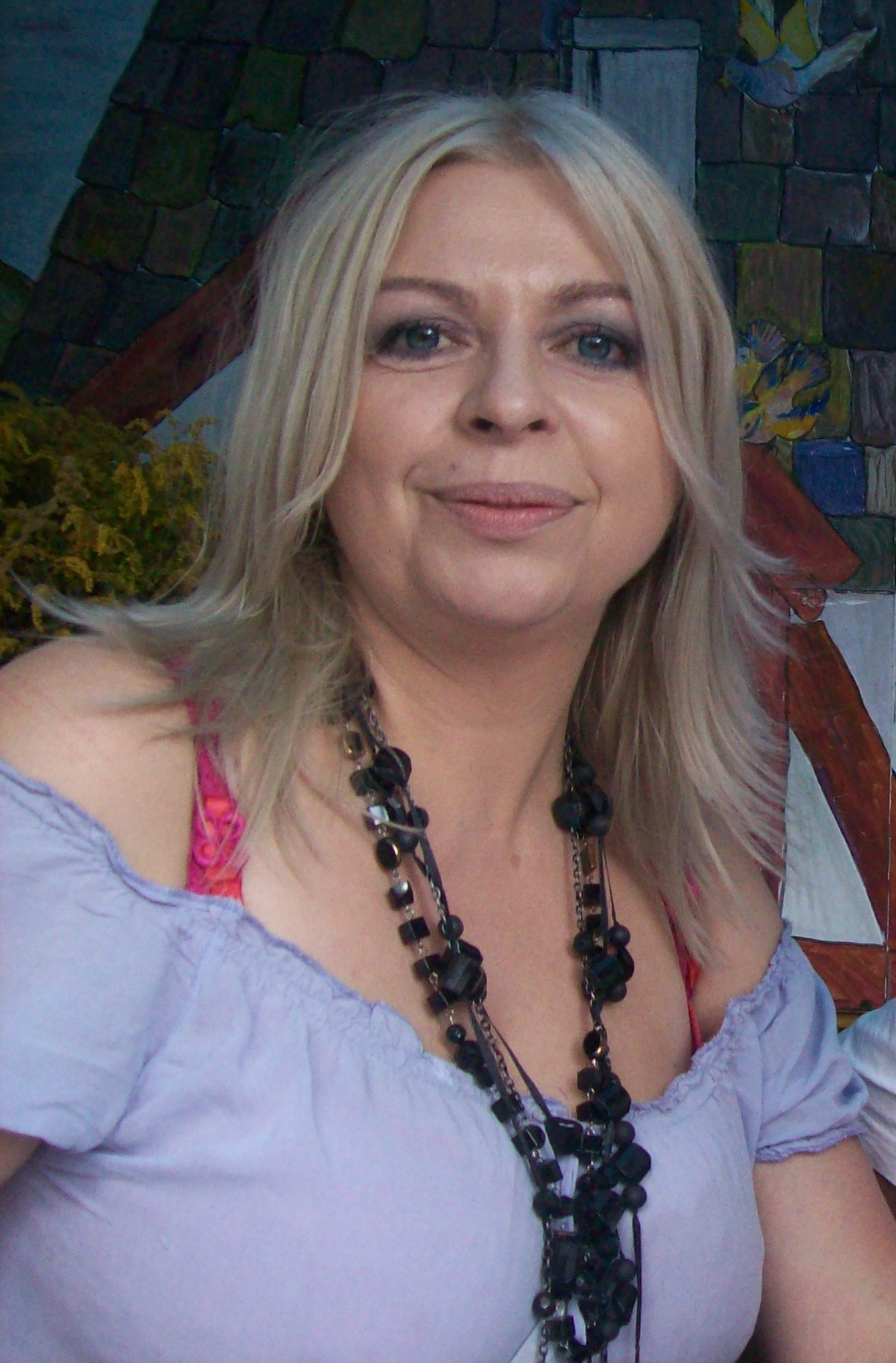 Violetta Arlak